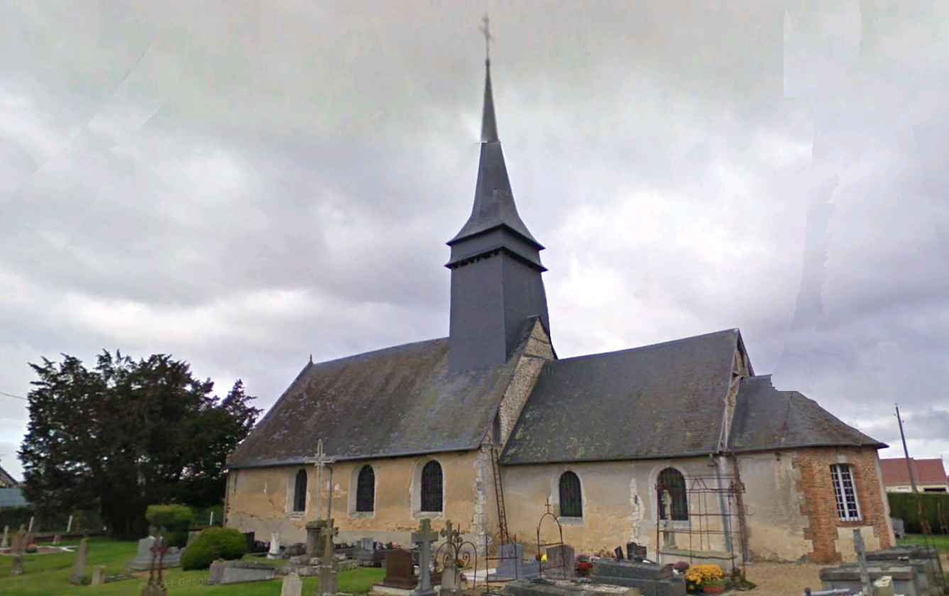 Eglise et If vue du cimetière